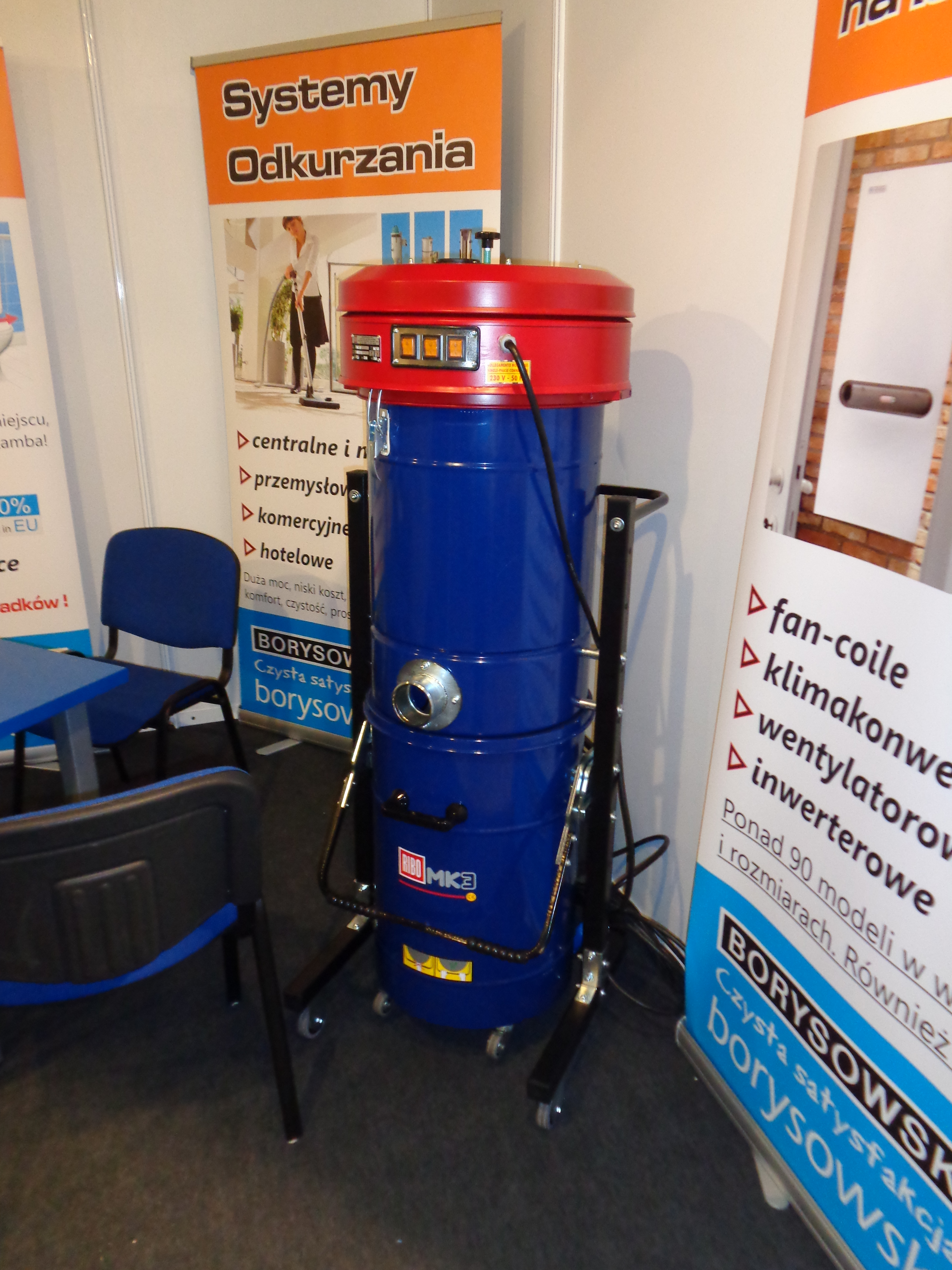 Odkurzacz centralny prezentowany podczas Targów HORECA 2013 w Krakowie.